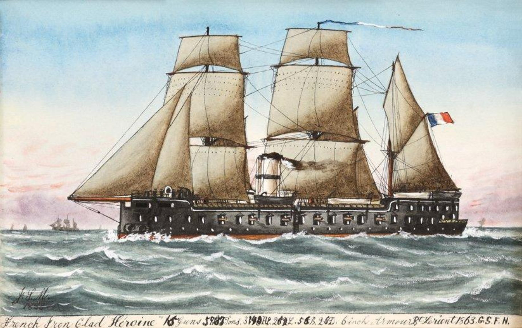 Portrait of Héroïne